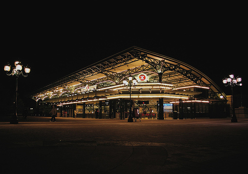 港鐵迪士尼站. 迪士尼站夜間外觀. 粵語: 迪士尼站夜間外觀.